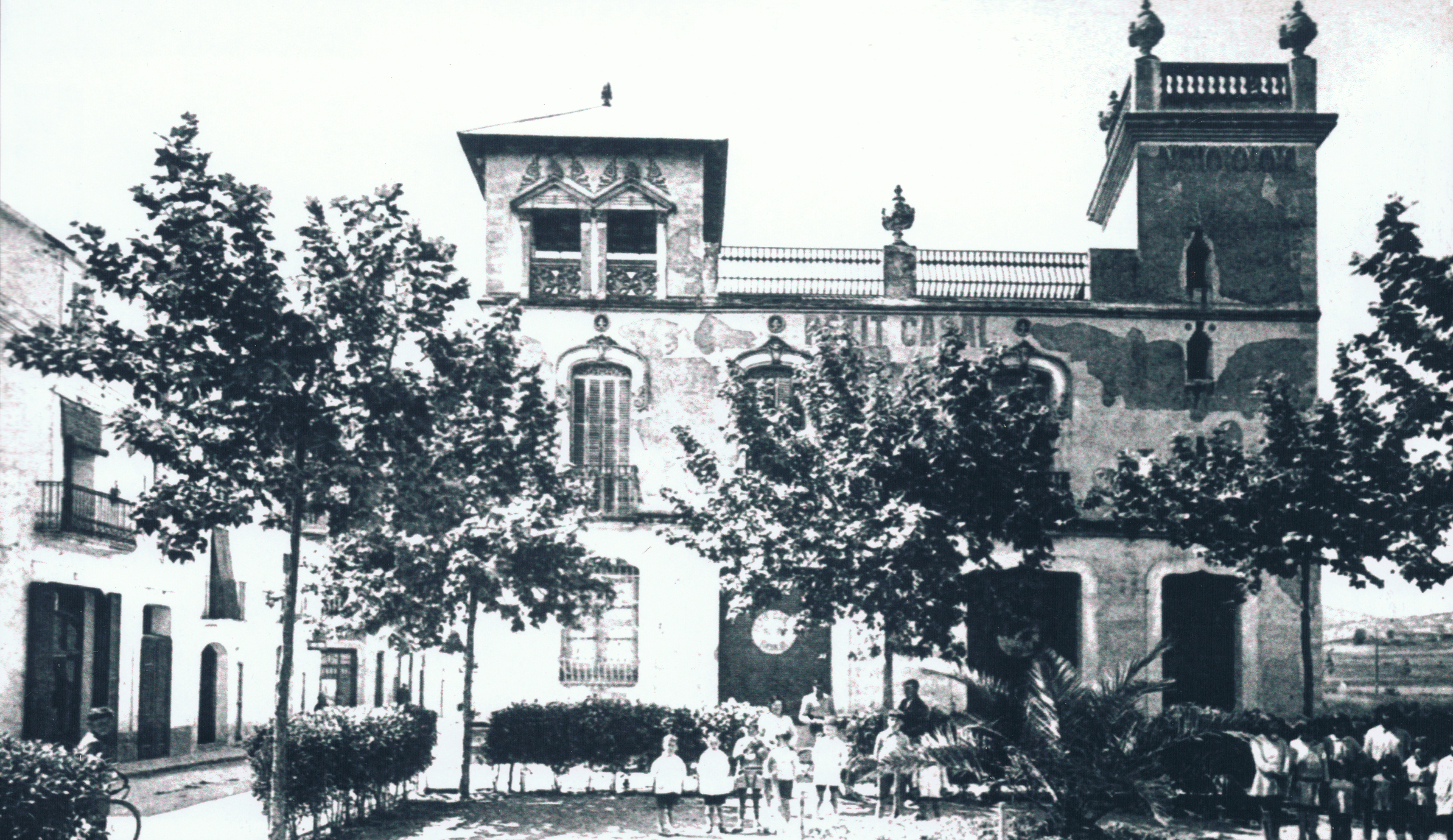 Petit Casal a principis de segle